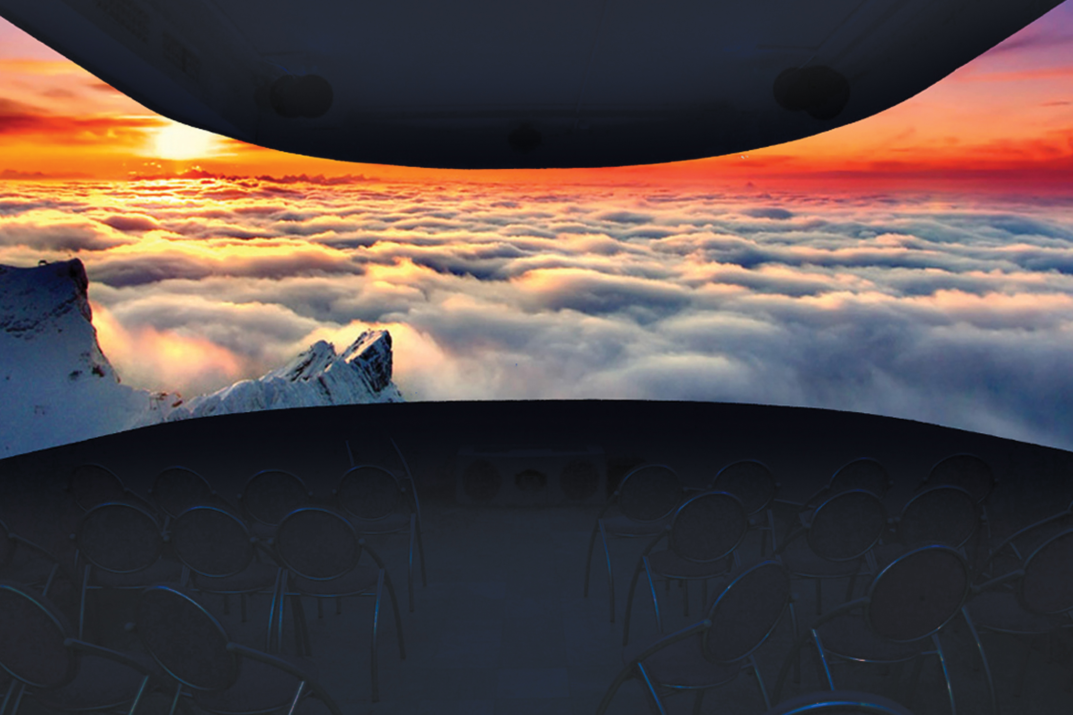 Зал Планетка Петербургского Планетария